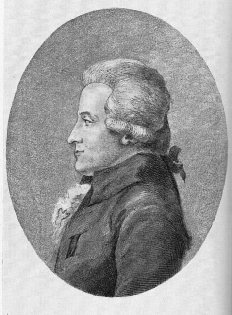 Johann Georg Zimmermann; Schabkunstblatt von J.E.Haid